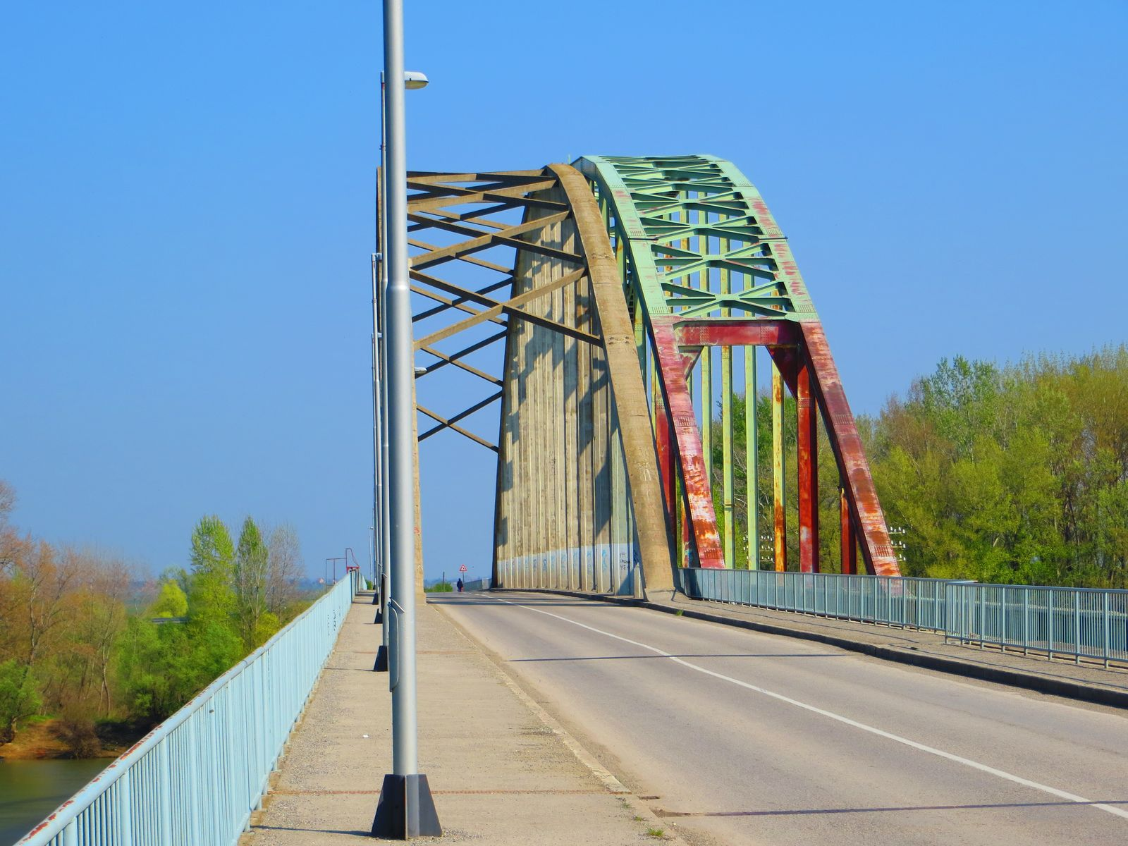 Žeželjev most